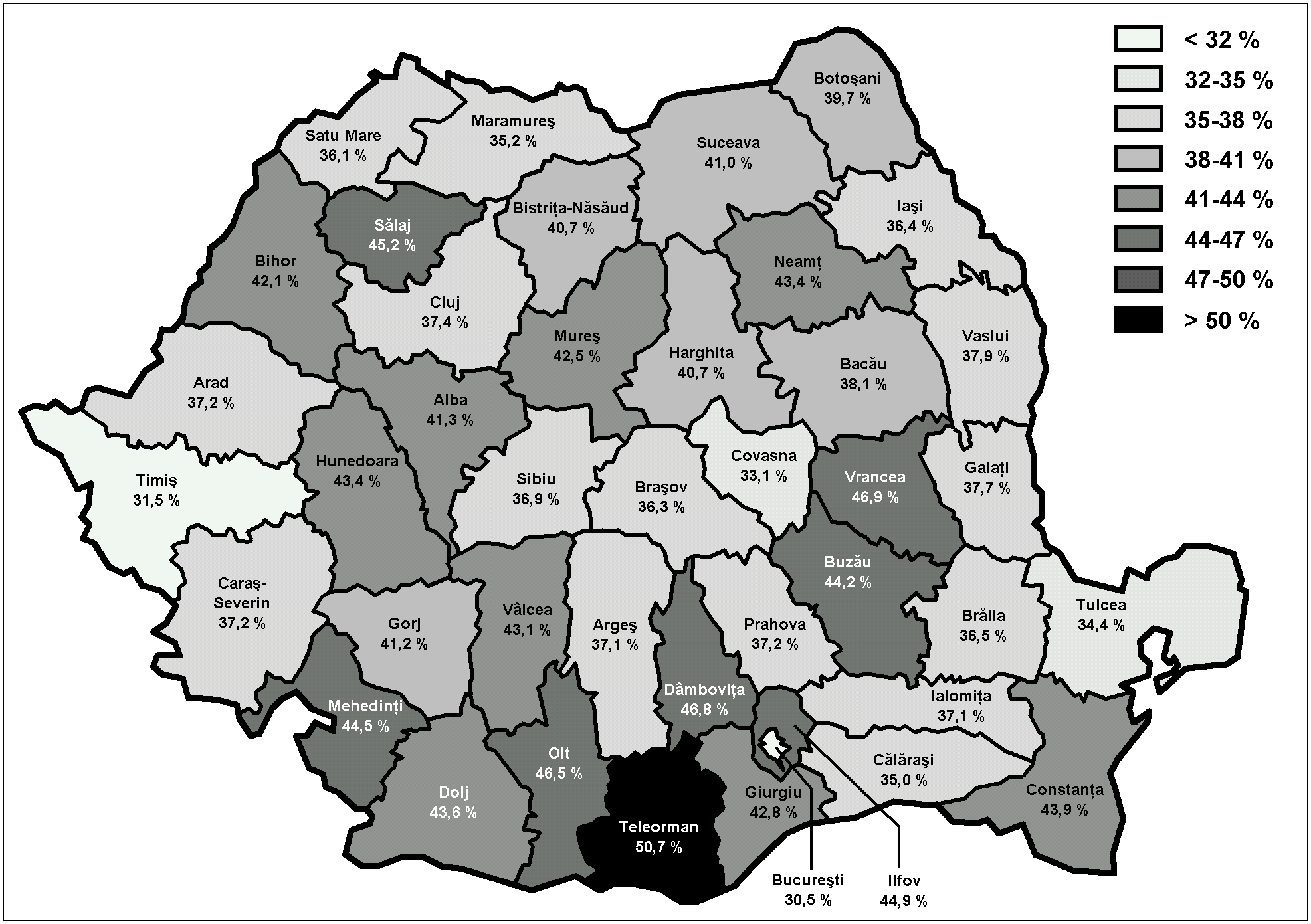 Wahlbeteiligung bei den Parlamentswahlen 2008 nach Kreisen